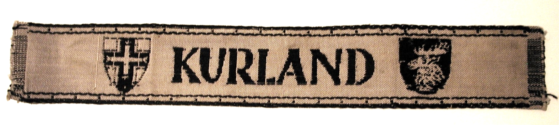 Ärmelbänder der Wehrmacht